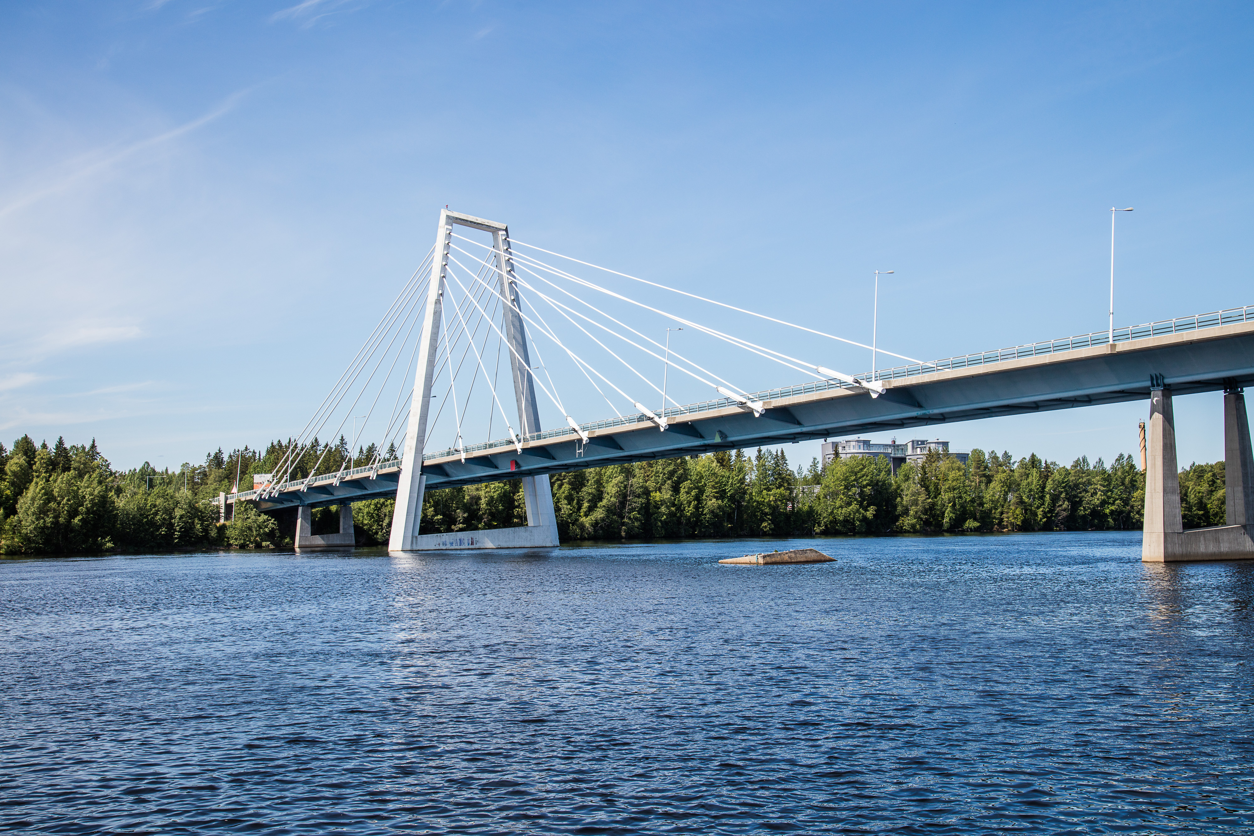 Kolbäcksbron över Umeälven förbinder stadsdelarna Sofiehem och Ön/Teg, och är sedan 2012 en del av E4.